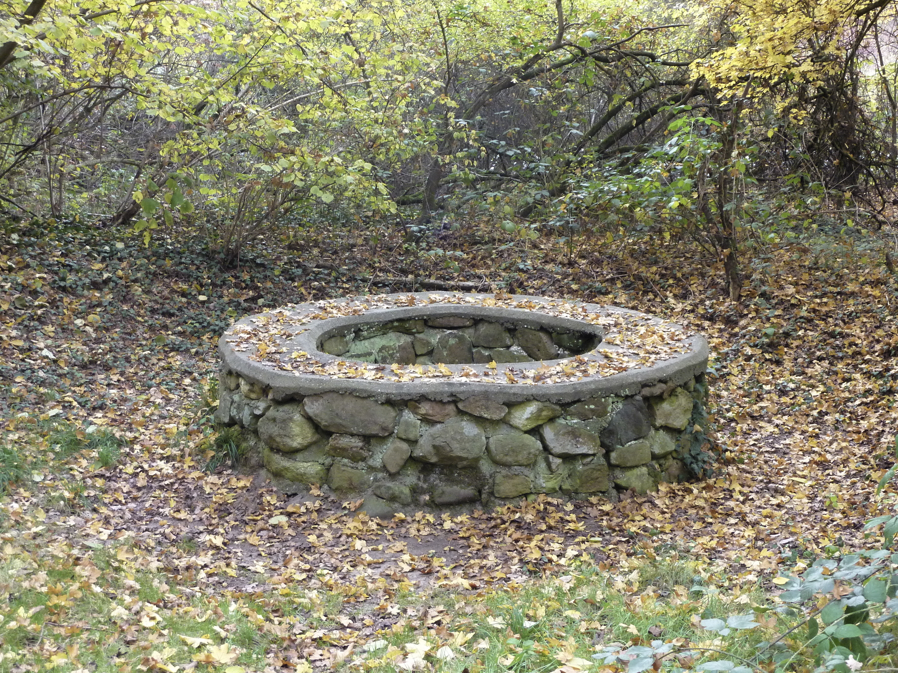 Frankfurt am Main, Stadtwald: Im äußersten Westen der Gemarkung Schwanheim wurde im Jahr 1973 ein 3,8 Meter tiefer römischer Steinbrunnen gefunden. Er stammt aus dem zweiten oder dritten Jahrhundert n. Chr. und wird den im selben Jahr in der Nähe bei der Stadt Kelsterbach entdeckten Resten einer römischen Villa rustica zugeordnet. Bei archäologischen Grabungen in der ohne Mörtel aus Natursteinen gemauerten Brunnenfassung fand man in 1½ Metern Tiefe ein menschliches Skelett und in 2,8 Metern Tiefe eine Stier-Skulptur aus Sandstein. Der Brunnenschacht ist heute zugeschüttet; der aus Putz bestehende Kragen der Brunnenfassung wurde wahrscheinlich erst nach der Wiederentdeckung im 20. Jahrhundert aufgesetzt